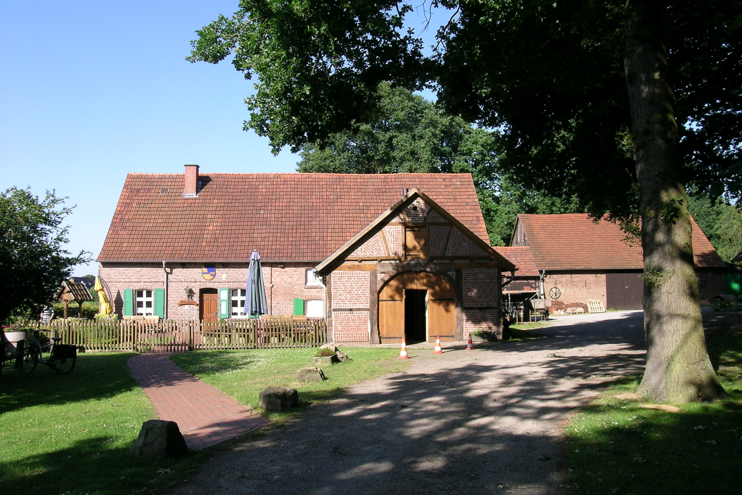 Heimathaus Lippramsdorf, Hofansicht